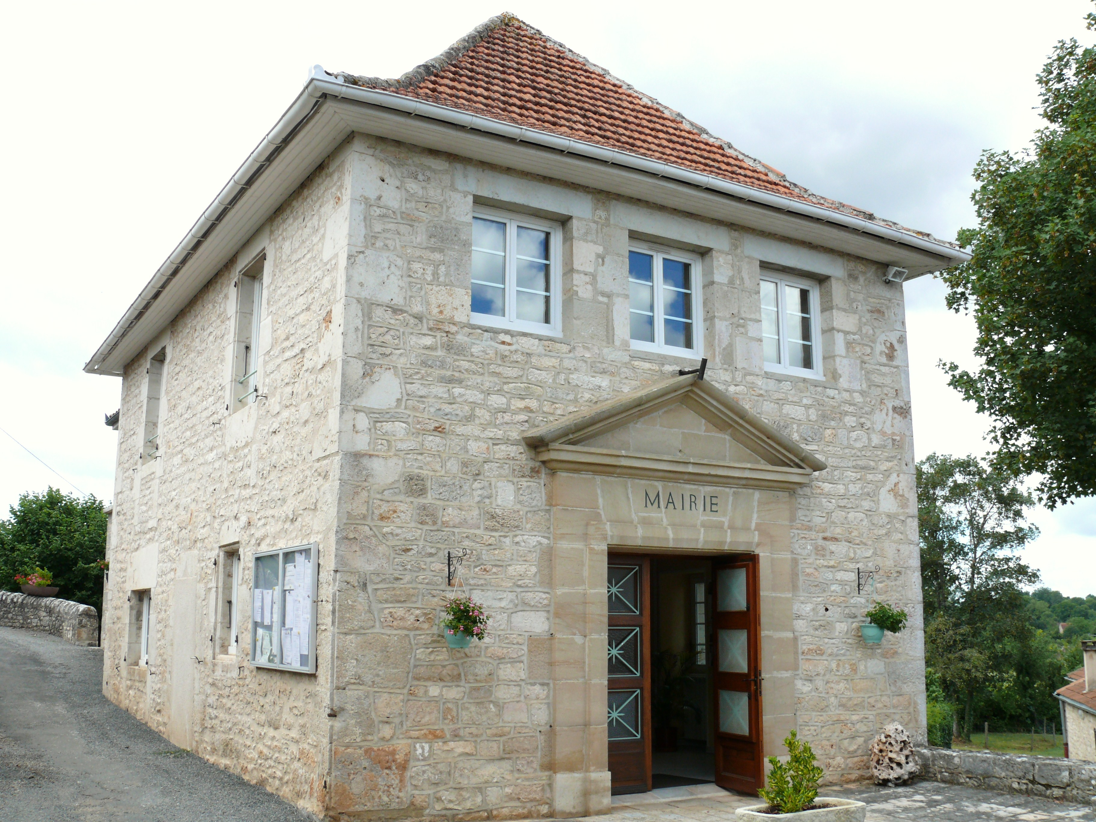 Issendolus - Mairie